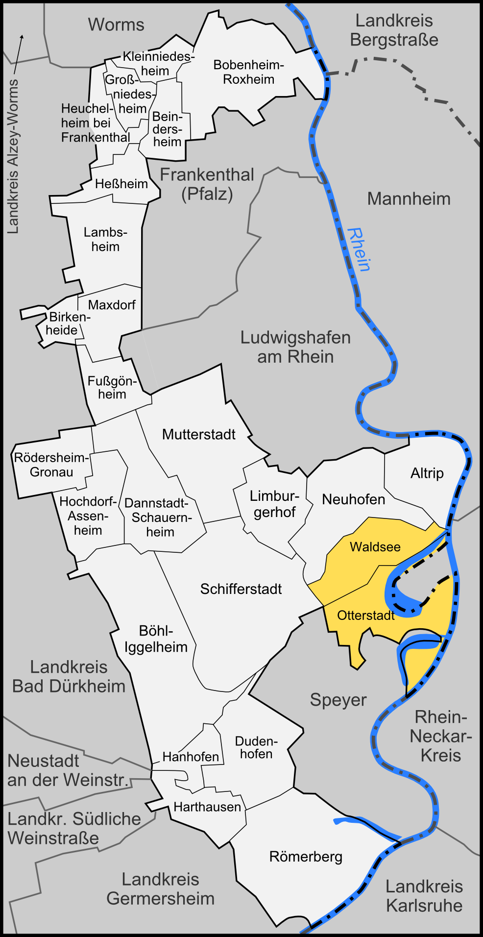 Karte der Verbandsgemeinde Waldsee im Rhein-Pfalz-Kreis